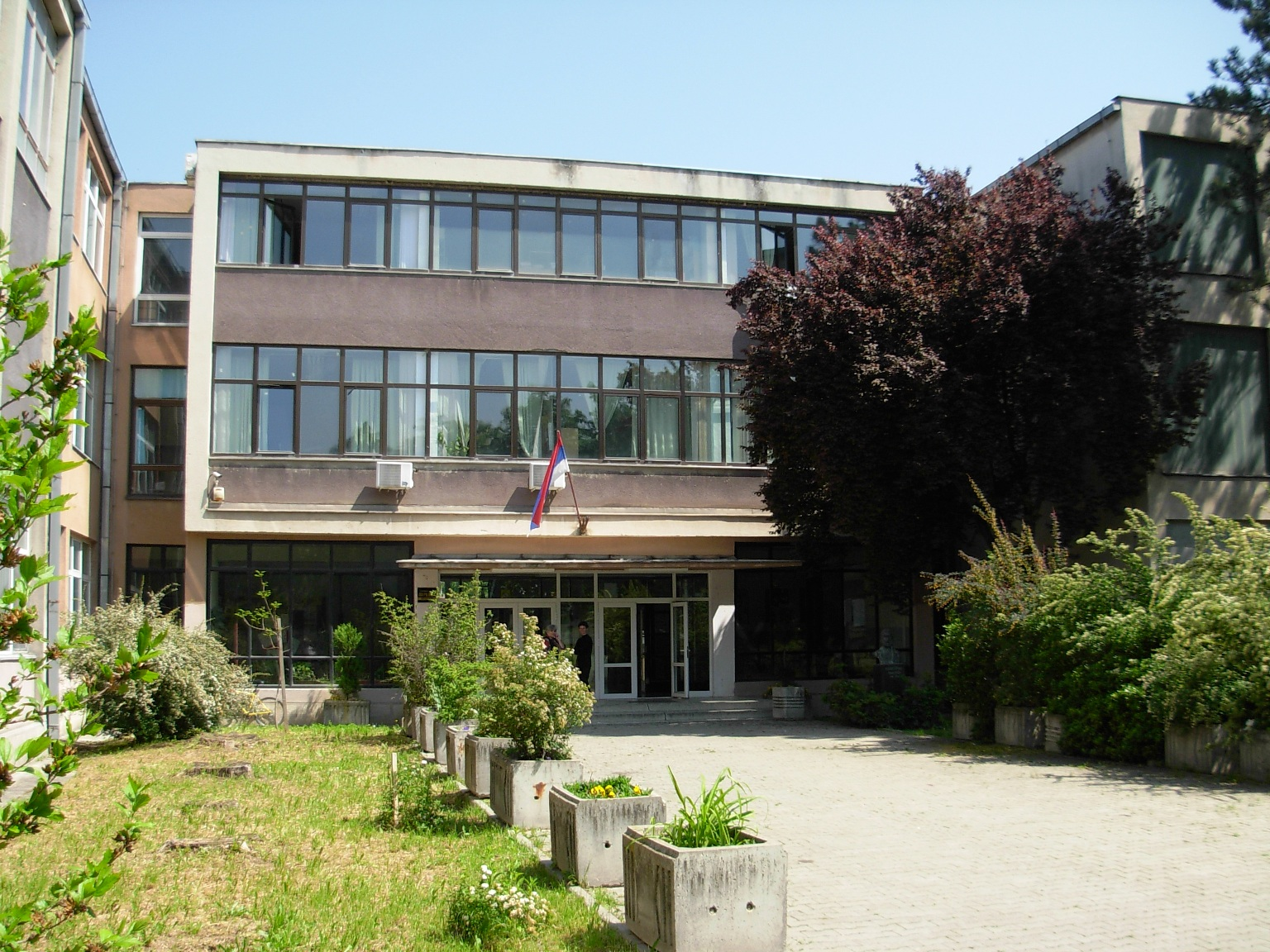 Osnovna škola "Jovan Grčić Milenko" u Beočinu.